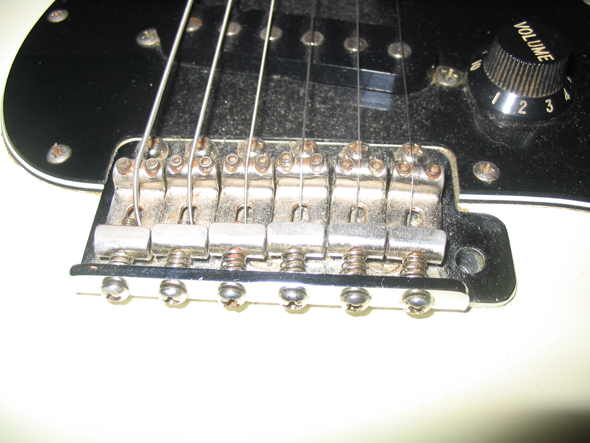 Eigenanfertigung